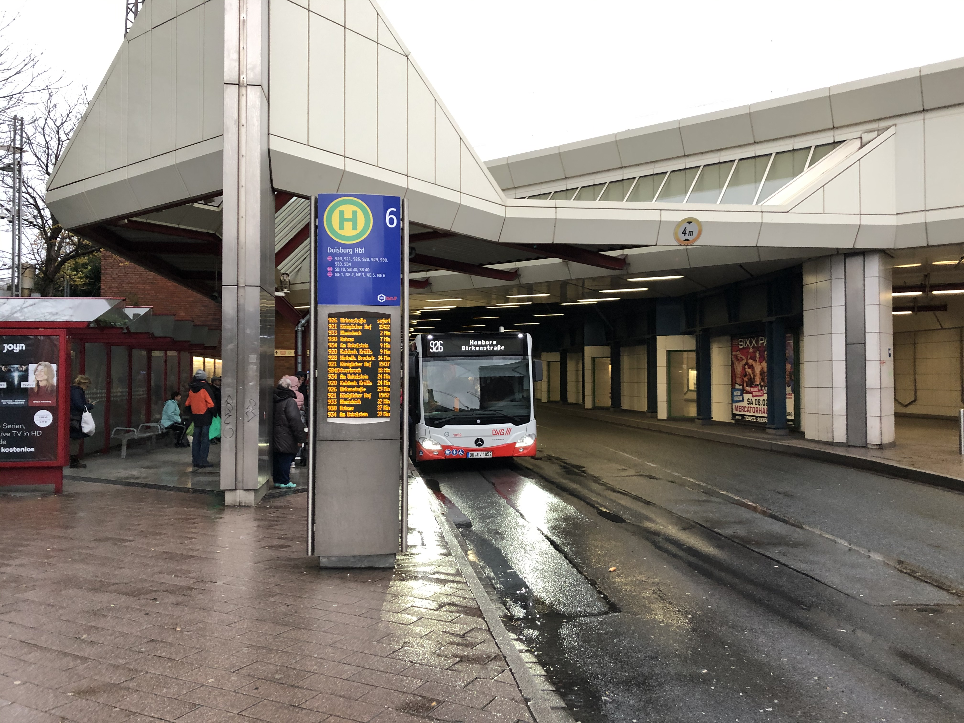 Bus der DVG auf der Linie 926 am Hauptbahnhof